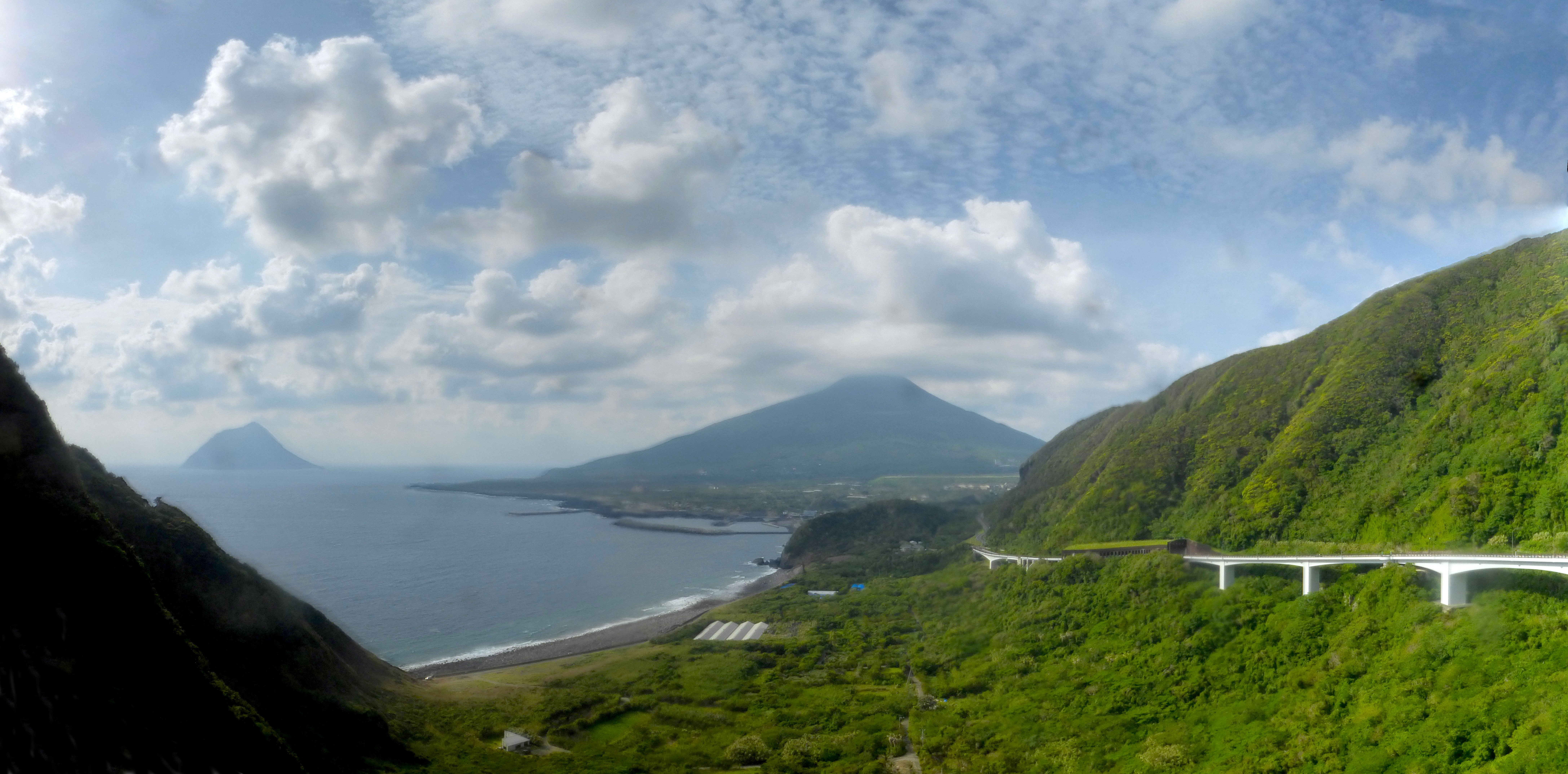 八丈島の大坂トンネル展望台からの景色 (The view from Osaka Tunnel on Hachijō-jima island)